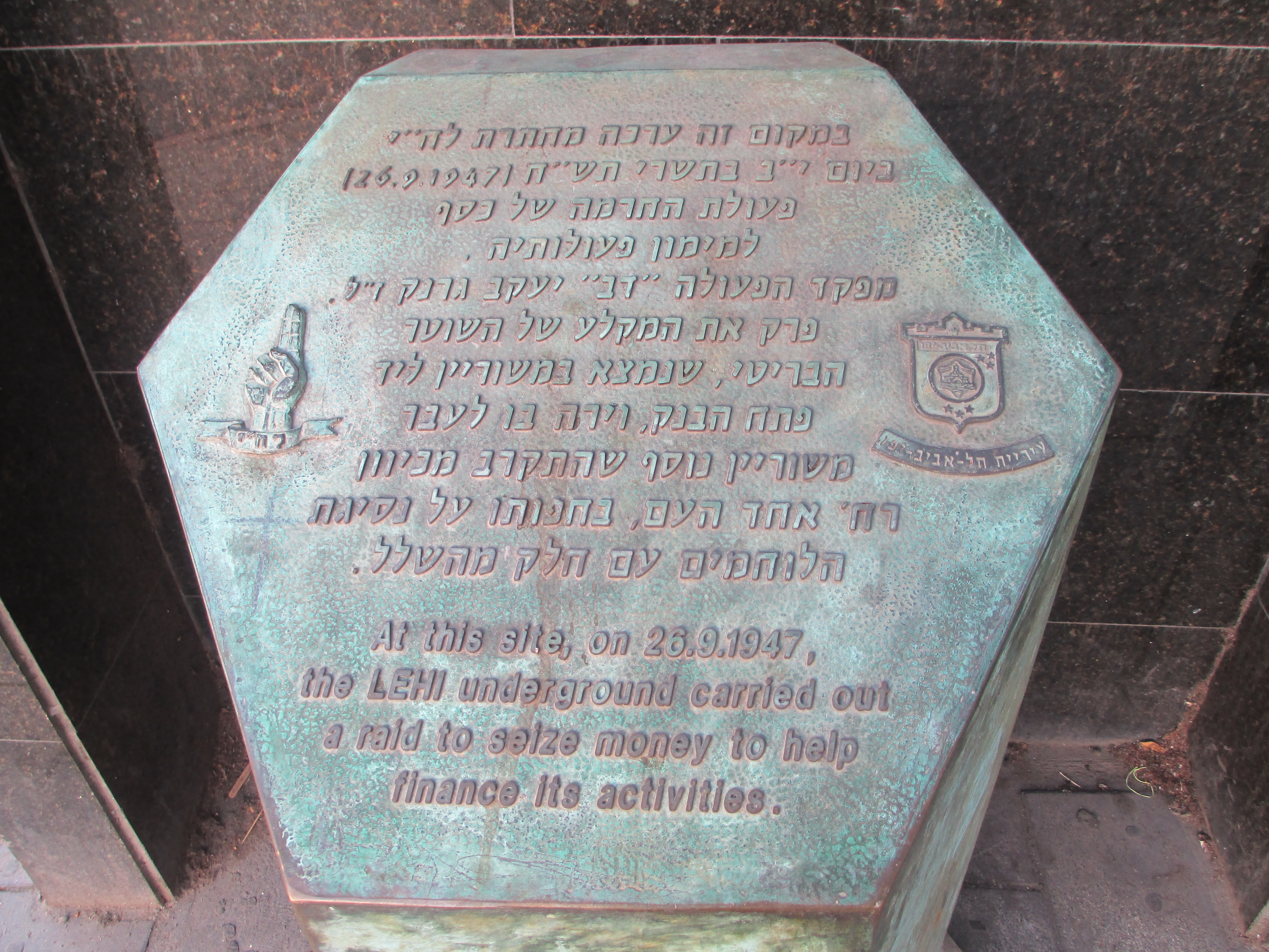 שלט על התקפת לח"י על בנק ברקליס ברחוב אלנבי 103 בתל אביב